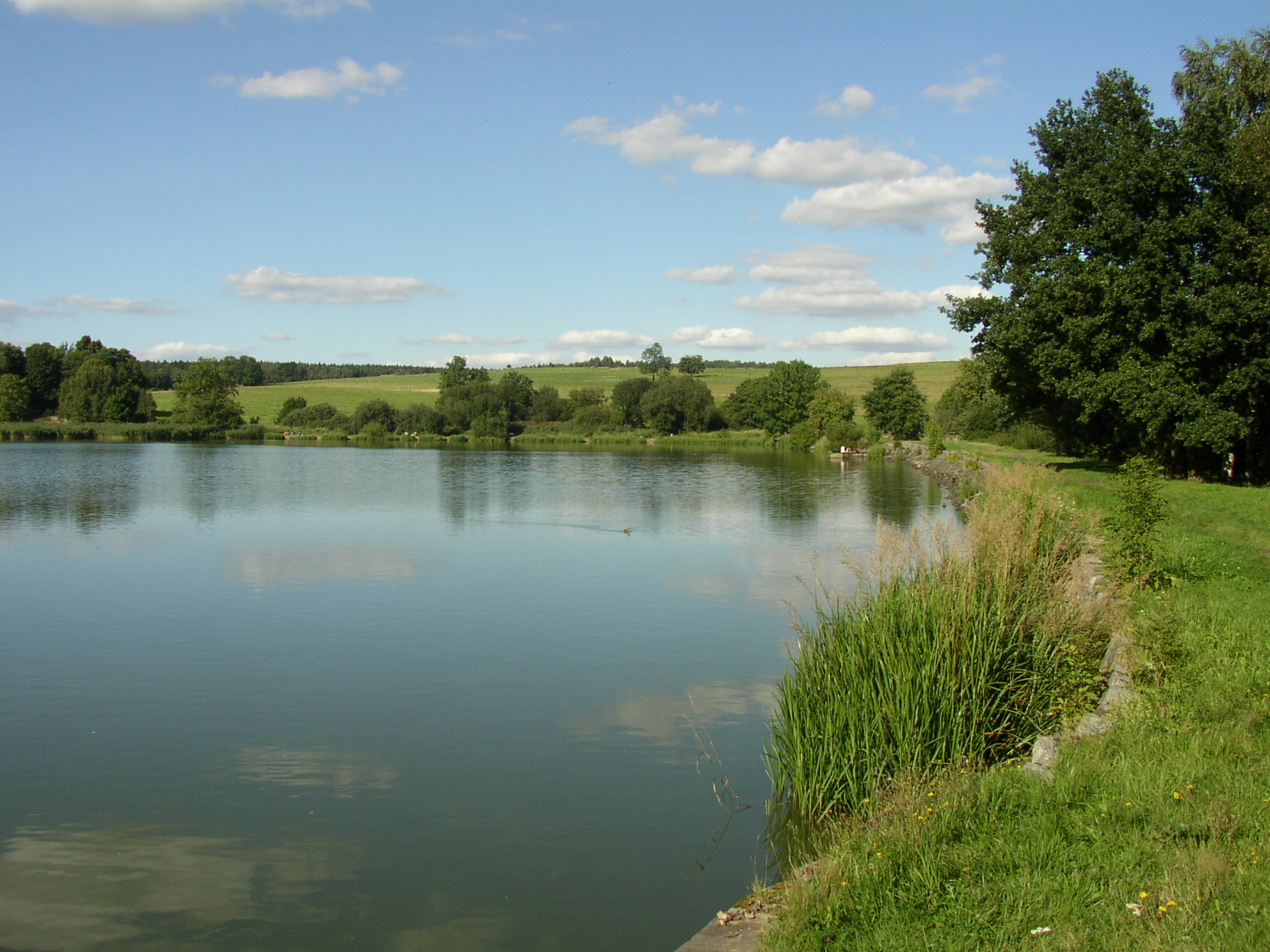 Hráz Velkého rybníka, Rybniště, okres Děčín, Česká republika